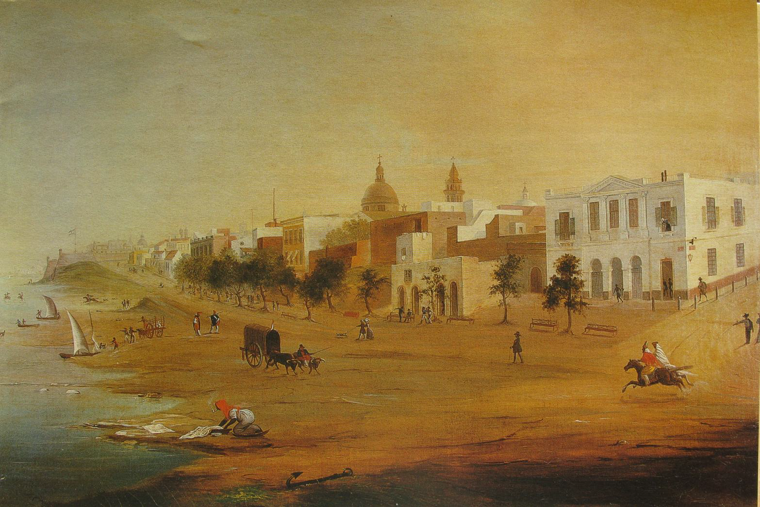 Vista de la ribera de Buenos Aires desde la actual esquina de las avenidas Leandro N. Alem y Corrientes. En el actual terreno del Edificio comega se ve una plazoleta y la residencia de Francisco Madero, luego transformada en Gran Hotel Nacional.